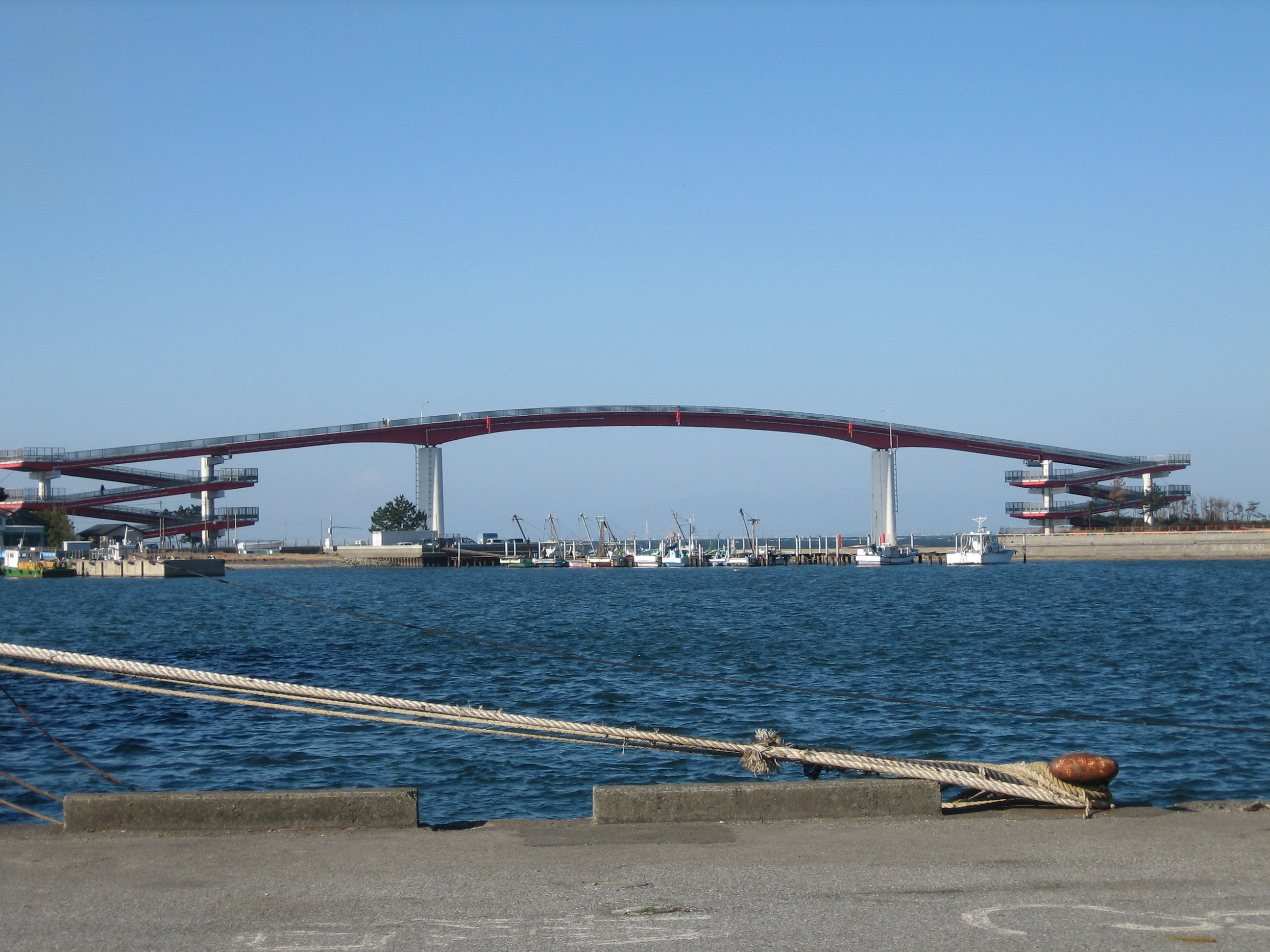 木更津港と中の島を結ぶ大橋。船が航行するため橋は高くなっている。